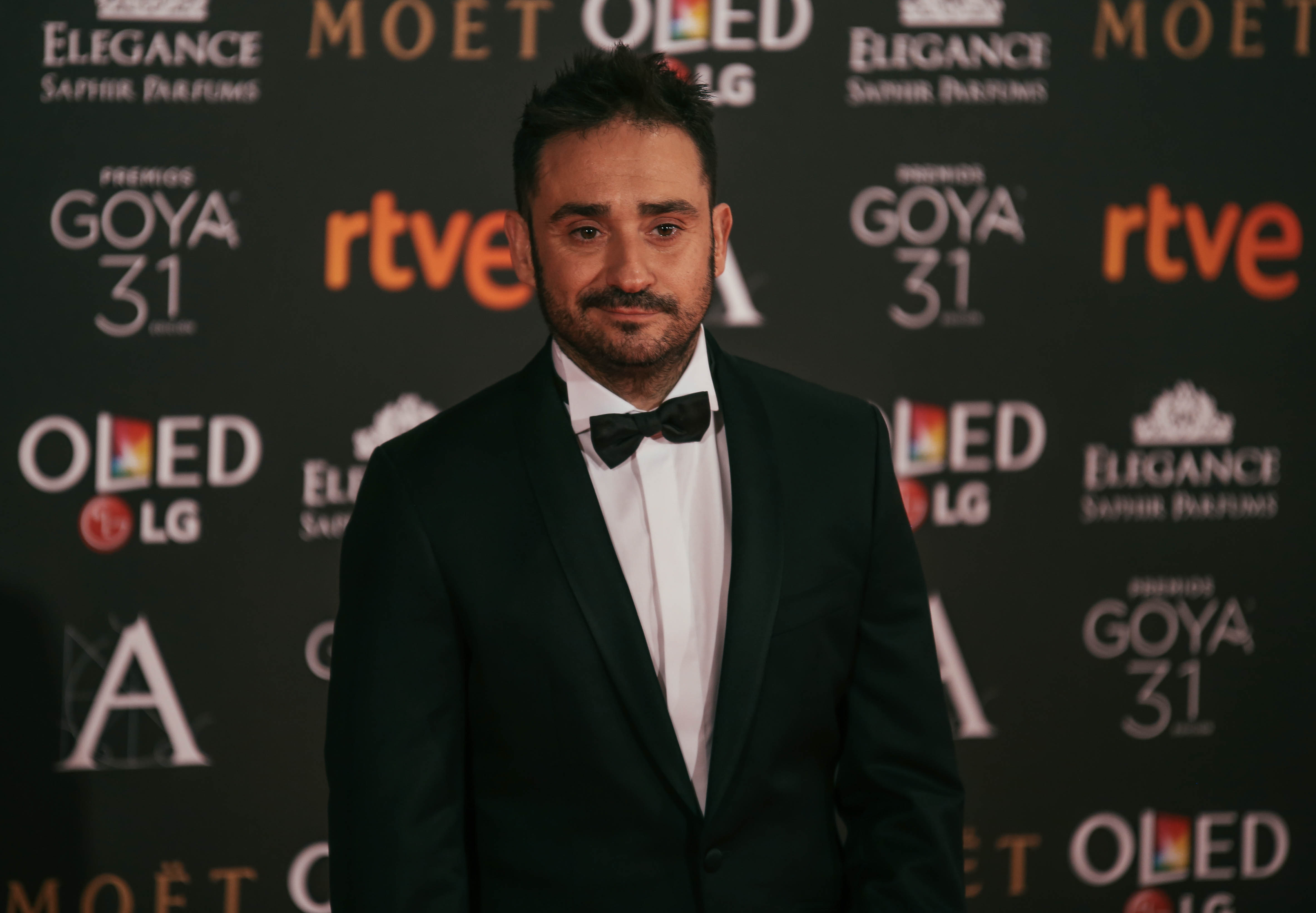 Juan Antonio Bayona en la alfombra roja de los Premios Goya 2017.